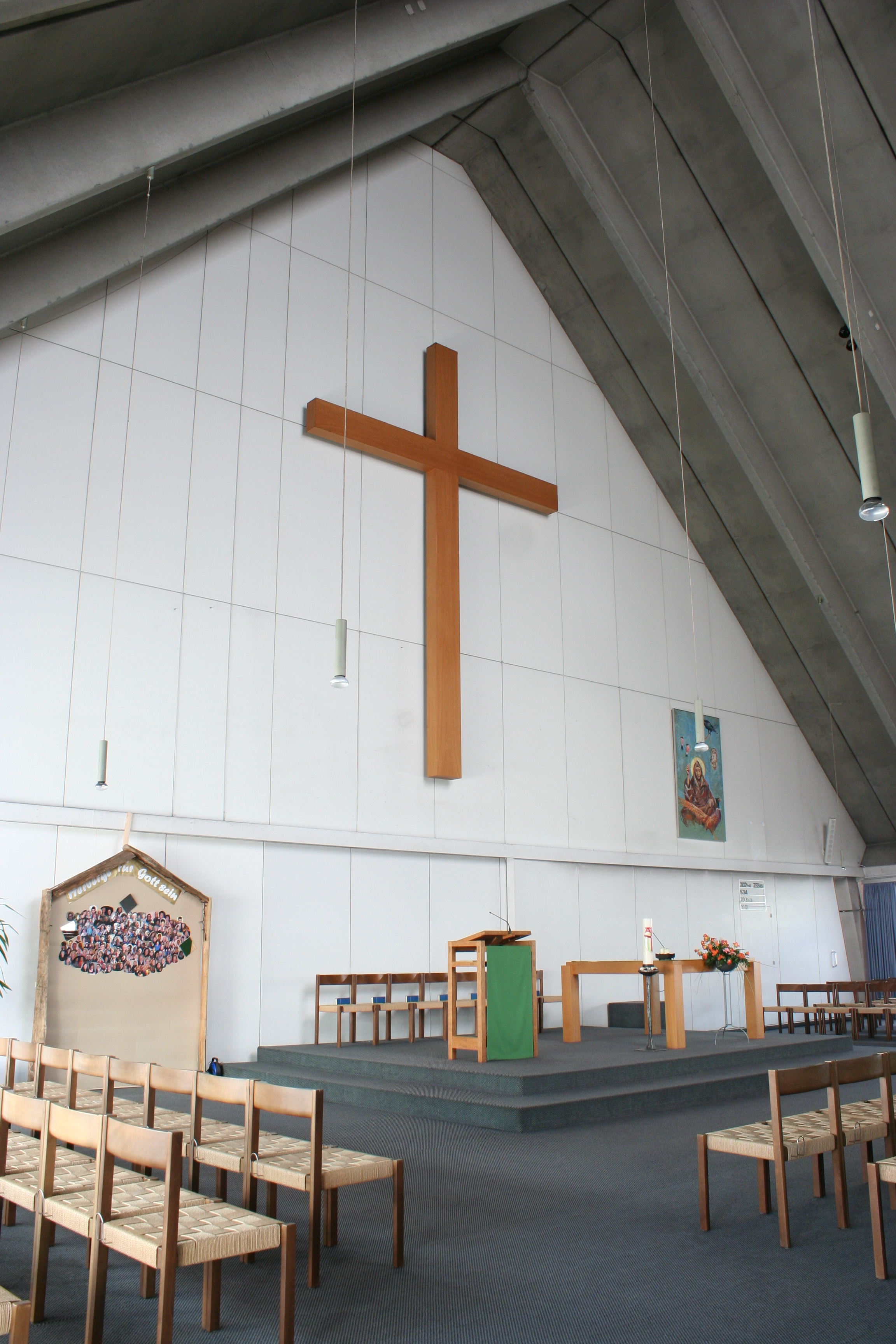 Römisch-katholische Pfarrkirche St. Franziskus Bassersdorf, Innenansicht